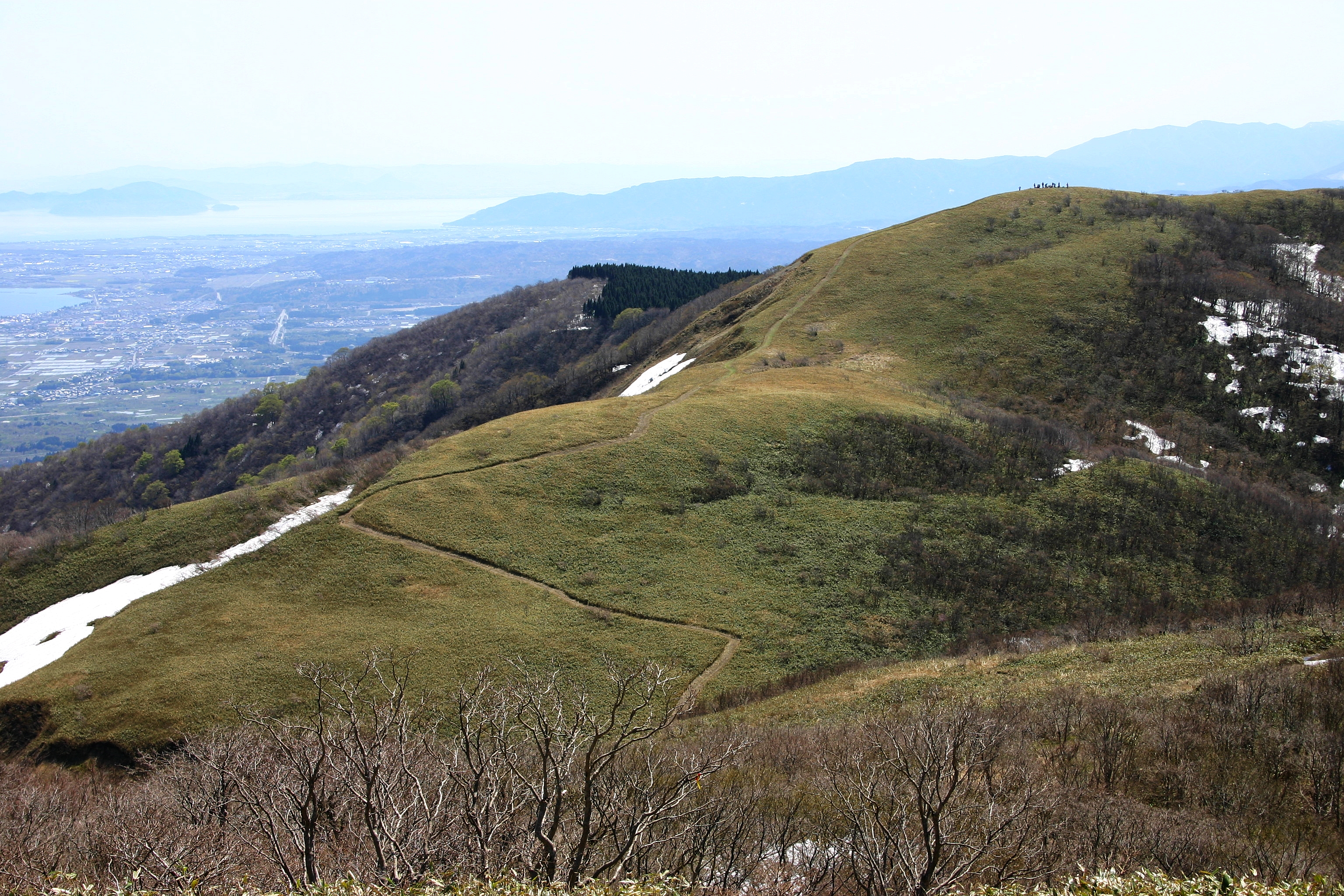 寒風から見た大谷山（人影が見える箇所が山頂である）。